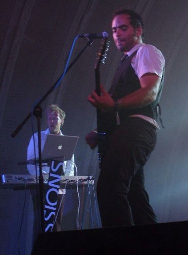 Karzi a Gregory Finn ze Southpaw na Rock for People 2008